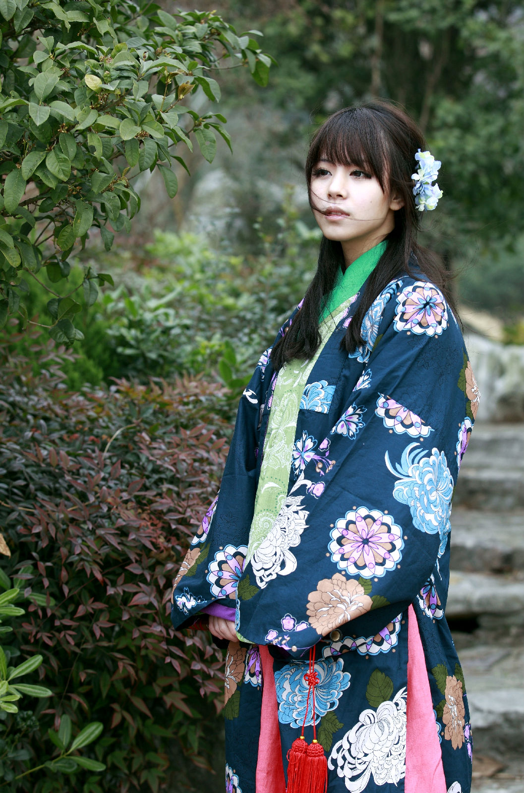 漢服展示